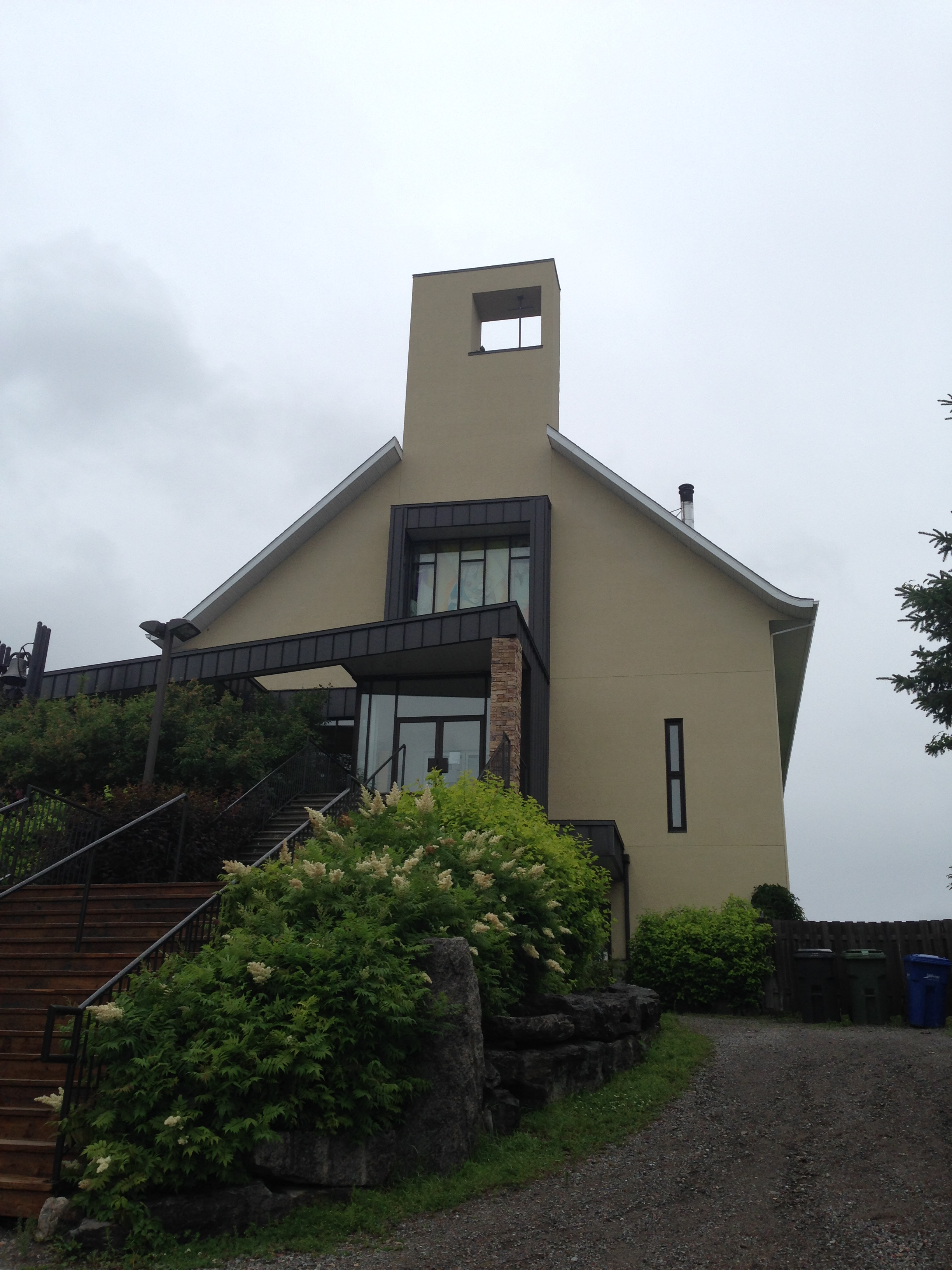 Côté du monastère